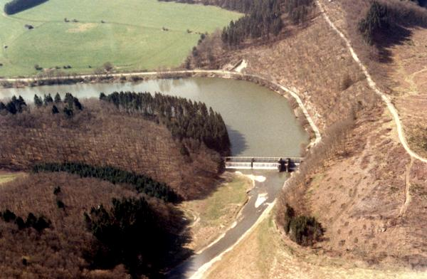 Misärsschleis.